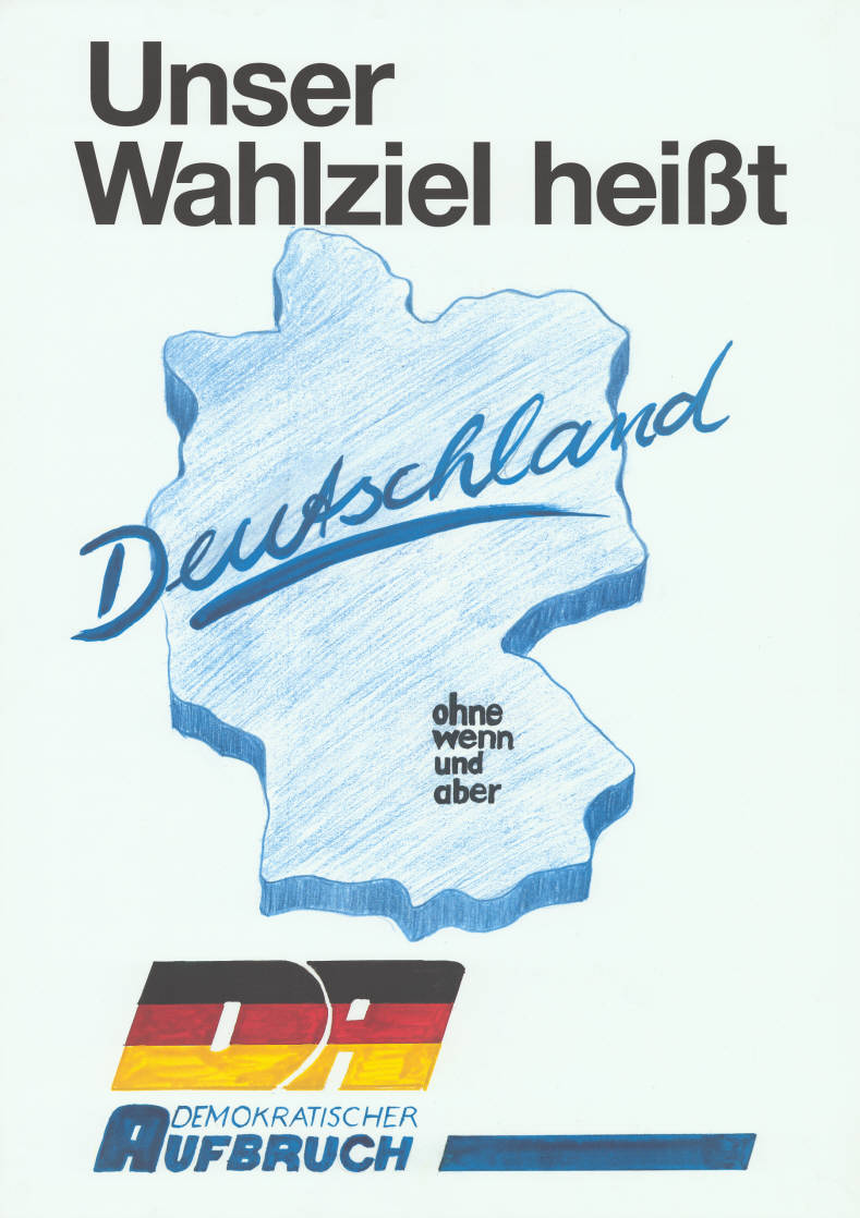 Unser Wahlziel heißt Deutschland ohne wenn und aber DA Demokratischer Aufbruch Abbildung: Deutschlandkarte ohne Grenzen - Logo in Nationalfarben (Grafik) Plakatart: Motiv-/Textplakat Auftraggeber: DA Objekt-Signatur: 10-024 : 5151 Bestand: Plakate aus der SBZ/DDR (10-024) GliederungBestand10-18: Plakate aus der SBZ/DDR (10-024) » Wahl zur Volkskammer am 18.3.1990 » Demokratischer Aufbruch (DA) Lizenz: KAS/ACDP 10-024 : 5151 CC-BY-SA 3.0 DE